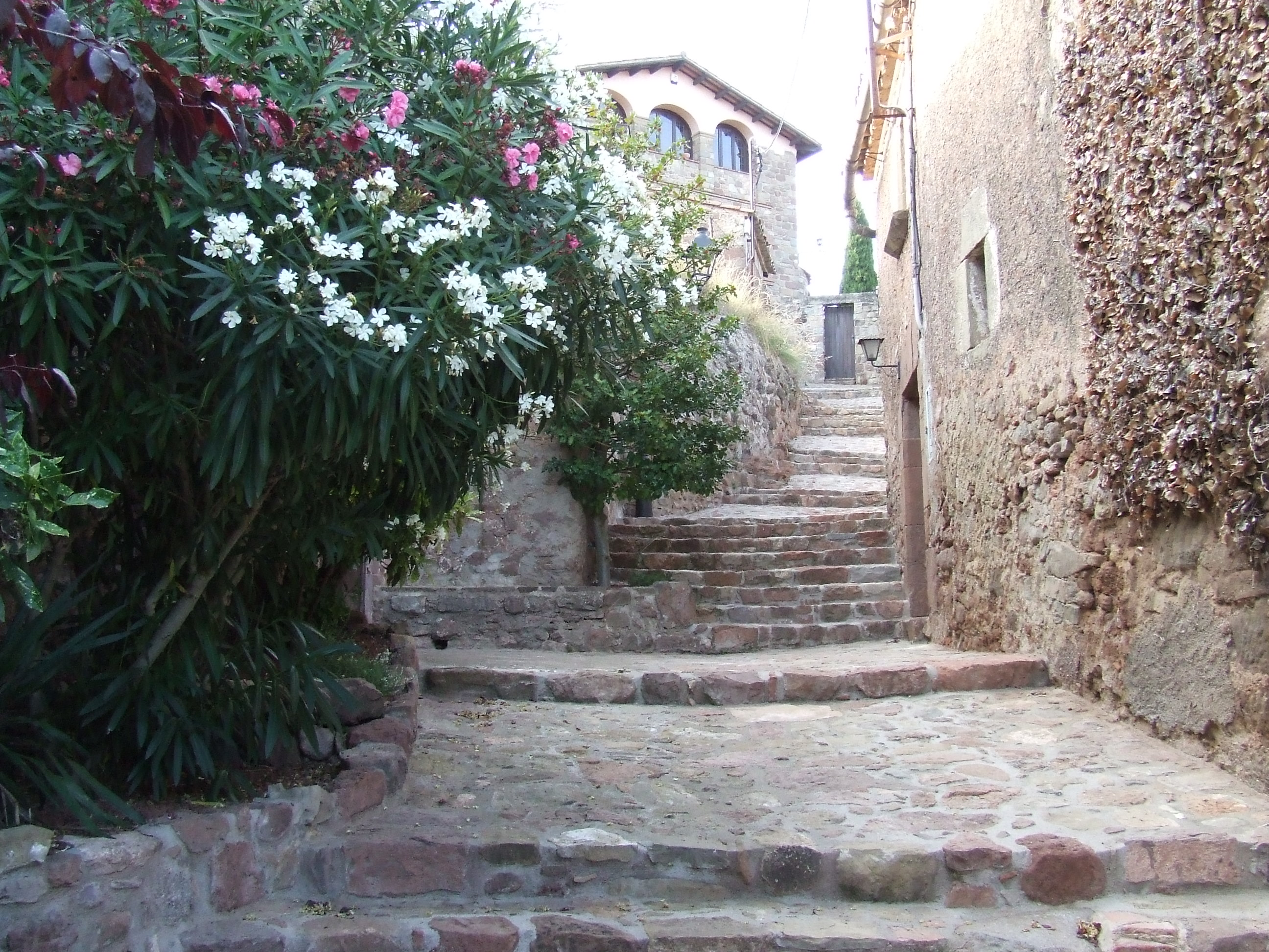 El carrer del Castell (Granera, Moianès)